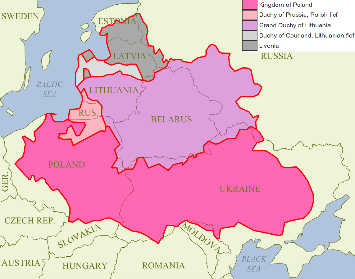 Modification de Rzeczpospolita2nar.png par incorporation de la légende